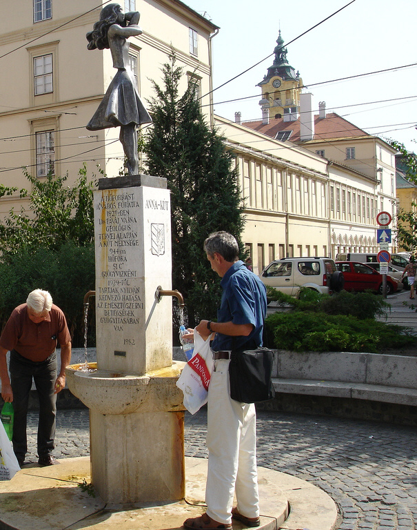 Táncosnő, Szeged